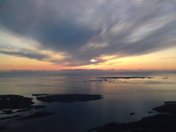 Lofotveggen